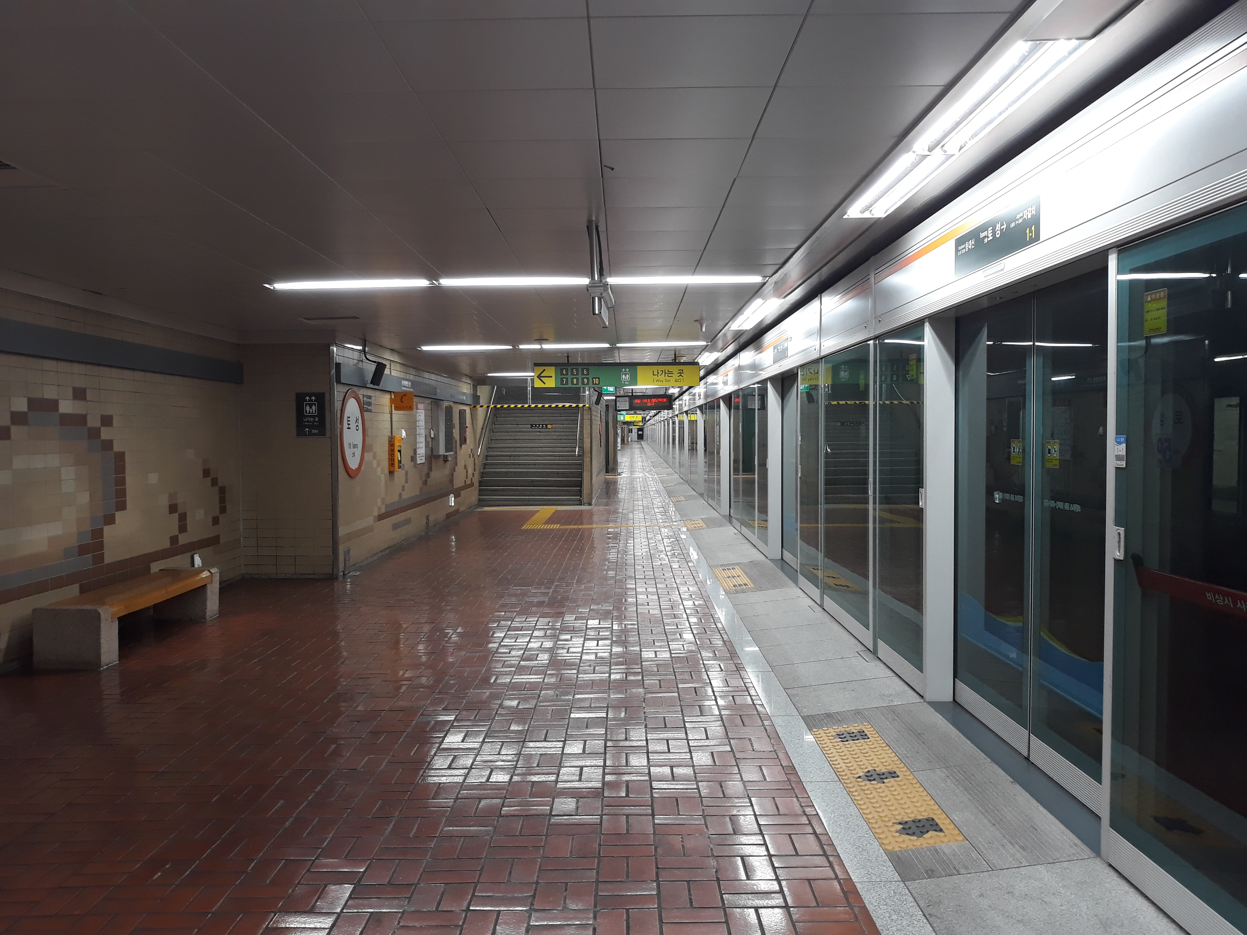 부산 도시철도 1호선 토성역 노포 방면 승강장